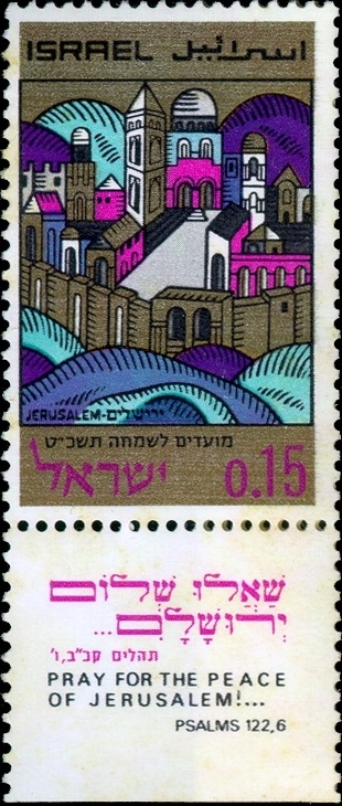 בולי מועדים לשמחה תשכ"ט